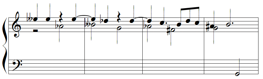 Anton Reicha - second sujet de la fugue n°34 des 36 fugues, op.36